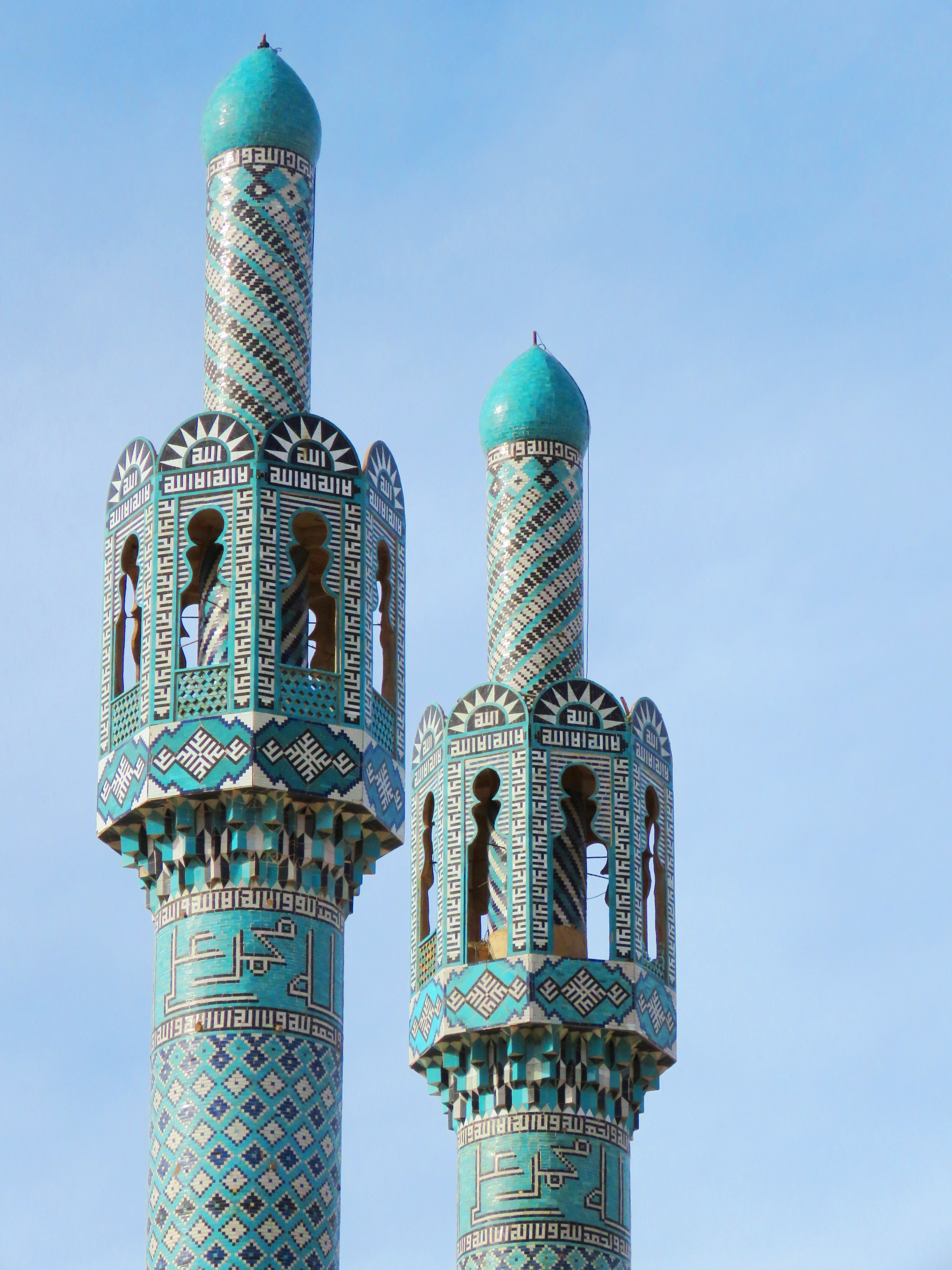 مقبره شاه نعمت الله ولی